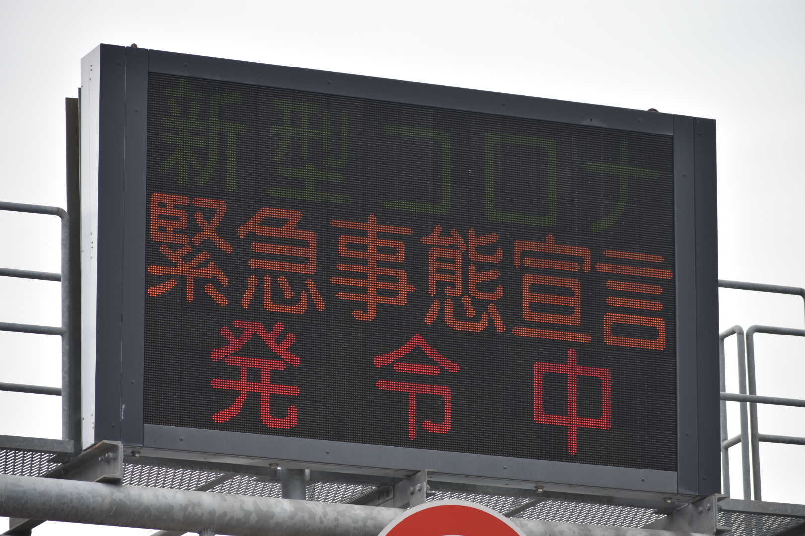 不要不急の外出を控えるよう呼びかける電光掲示板。奈良県奈良市。